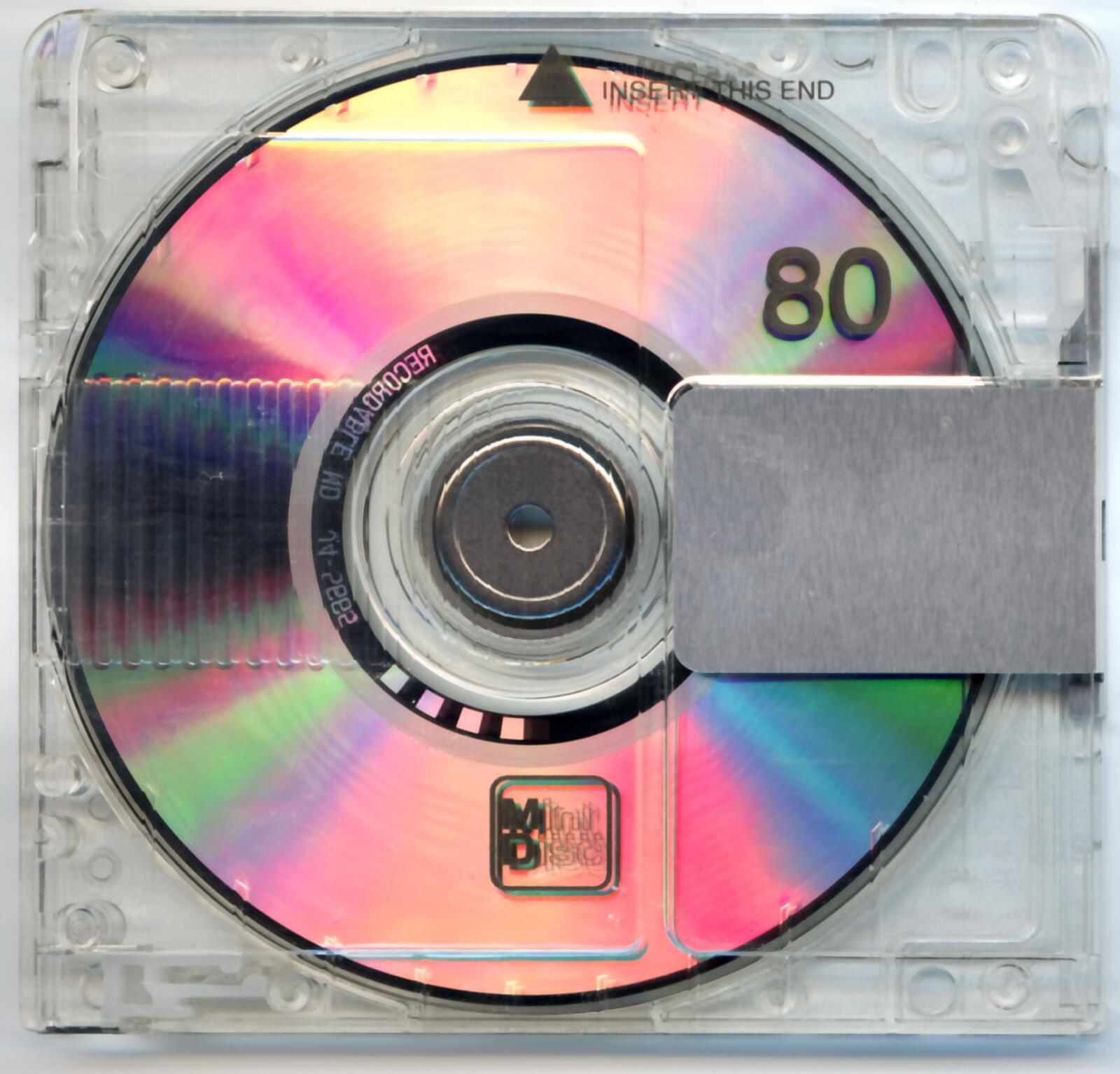 80min MiniDisc